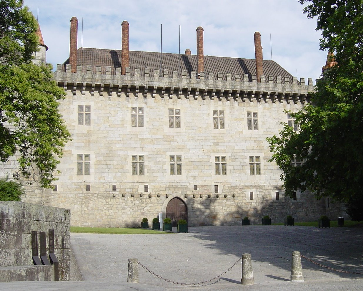 Paço Ducal de Guimarães